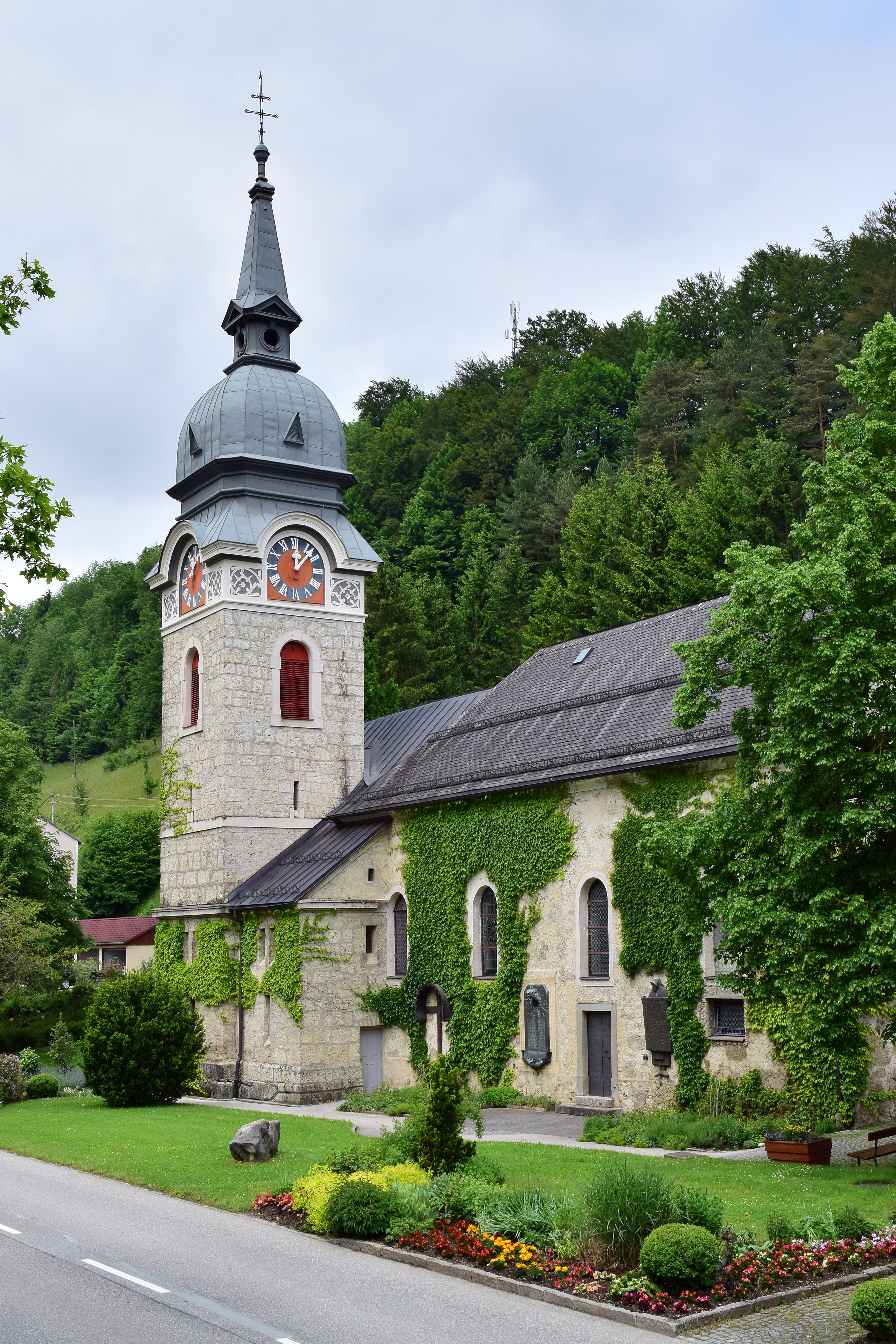 Kath. Pfarrkirche Mariä Himmelfahrt